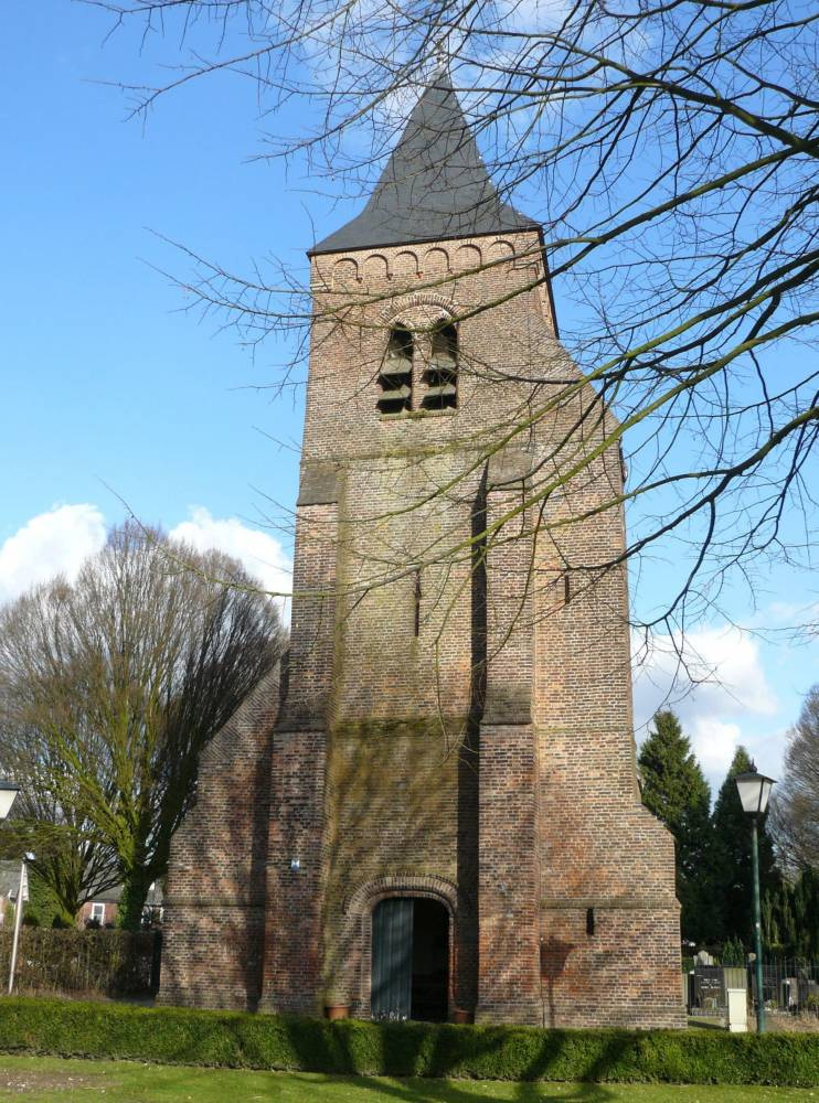 De Oude Toren te Enschot, bewaard gebleven restant van de Sint-Michielskerk.